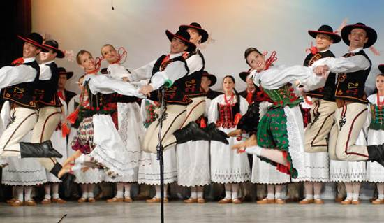 Inauguracja sezonu 2006 w Zespole Pieśni i Tańca Śląsk